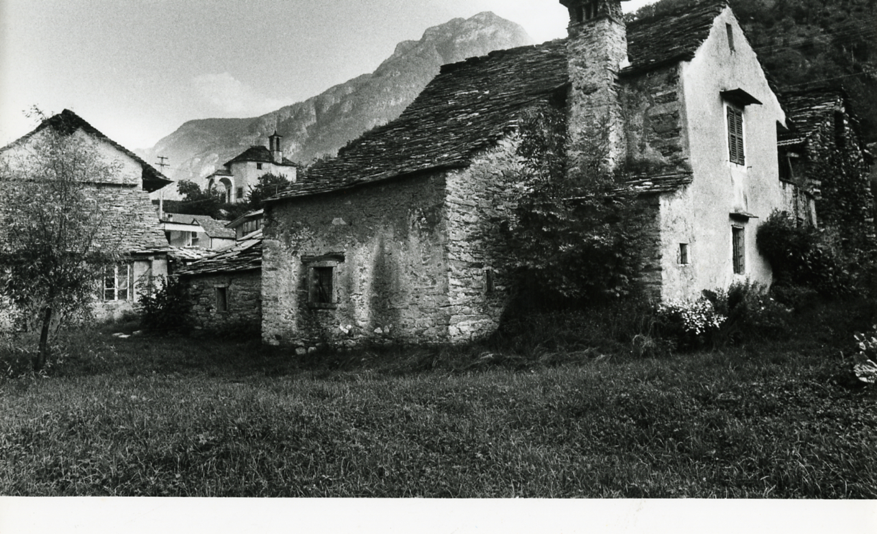 Servizio fotografico : Pieve Vergonte, 1982 / Paolo Monti. - Stampe: 2 : Positivo b/n, gelatina bromuro d'argento/ carta, 24x30. - ((Al verso delle stampe manoscritti i numeri dei negativi corrispondenti (formato 35 mm) con indicazione del fotogramma: 3826/21, 3845/11; iscrizione didascalica manoscritta a matita: "Loro". - Sul coperchio della scatola iscrizione didascalica manoscritta a pennarello nero: "Ossola". - Occasione: Documentazione per pubblicazione. - Fonte: Agenda di Paolo Monti: Nikon Leika 3001-/ Monti 1978 (1978-1982), presso Archivio Paolo Monti